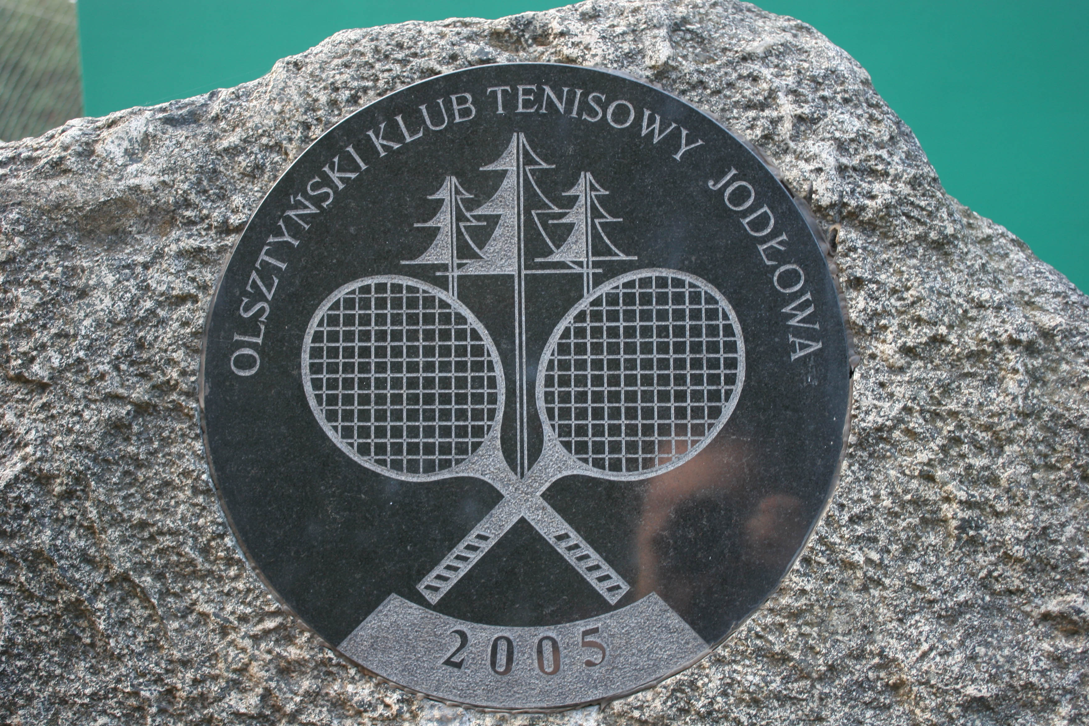 Znaczek klubu na kamieniu przed wejściem na korty